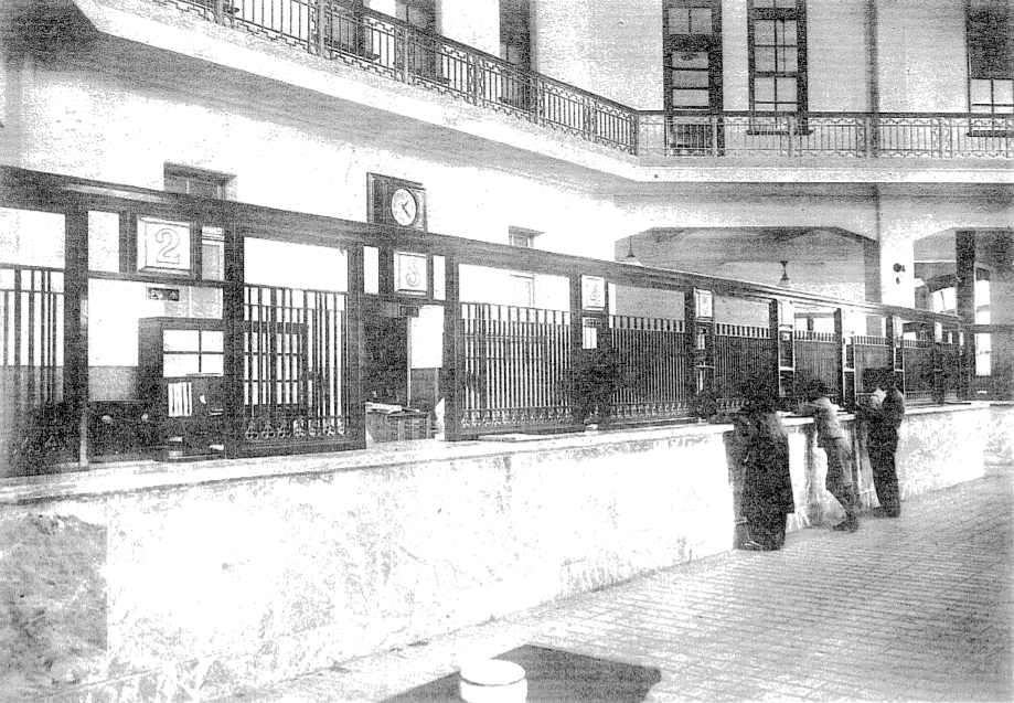 中文（台灣）: 1933年落成的第二代臺中郵便局現業室，位於台中市寶町一丁目。